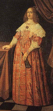 Frau von Adolf Friedrich I.